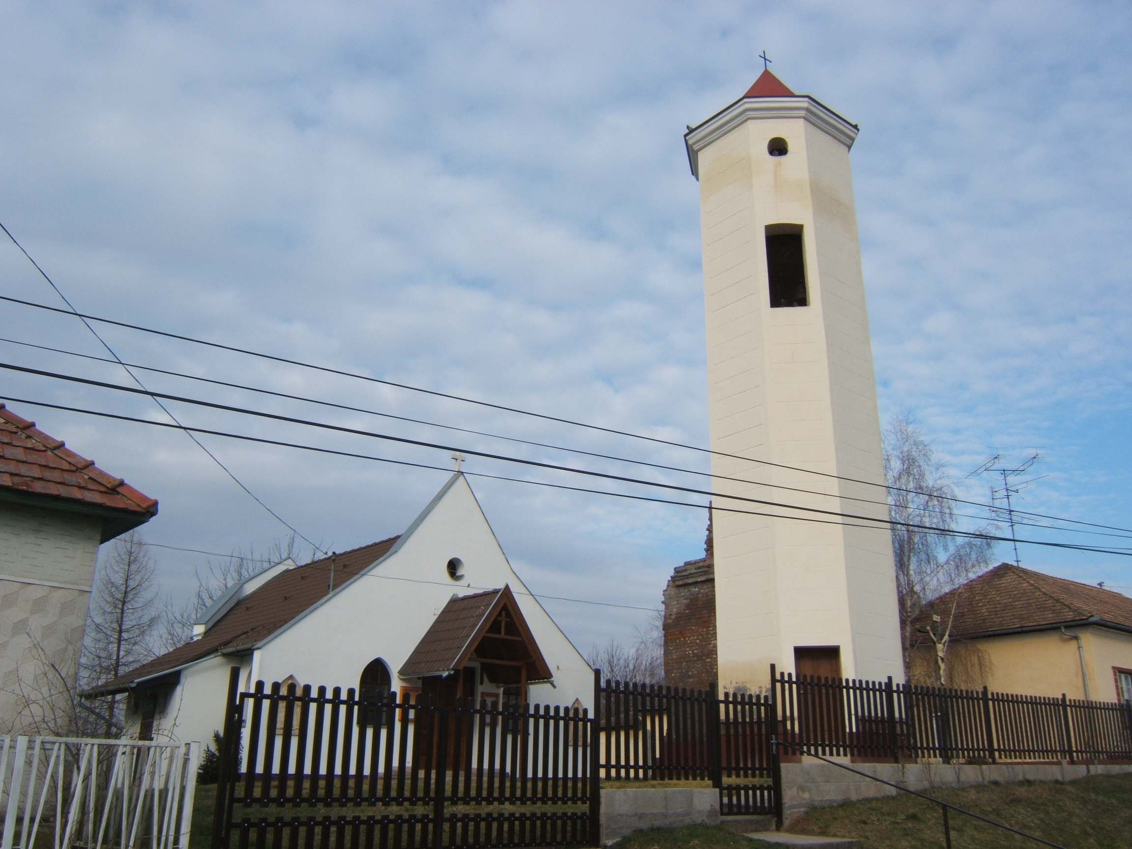 Bakháza temploma